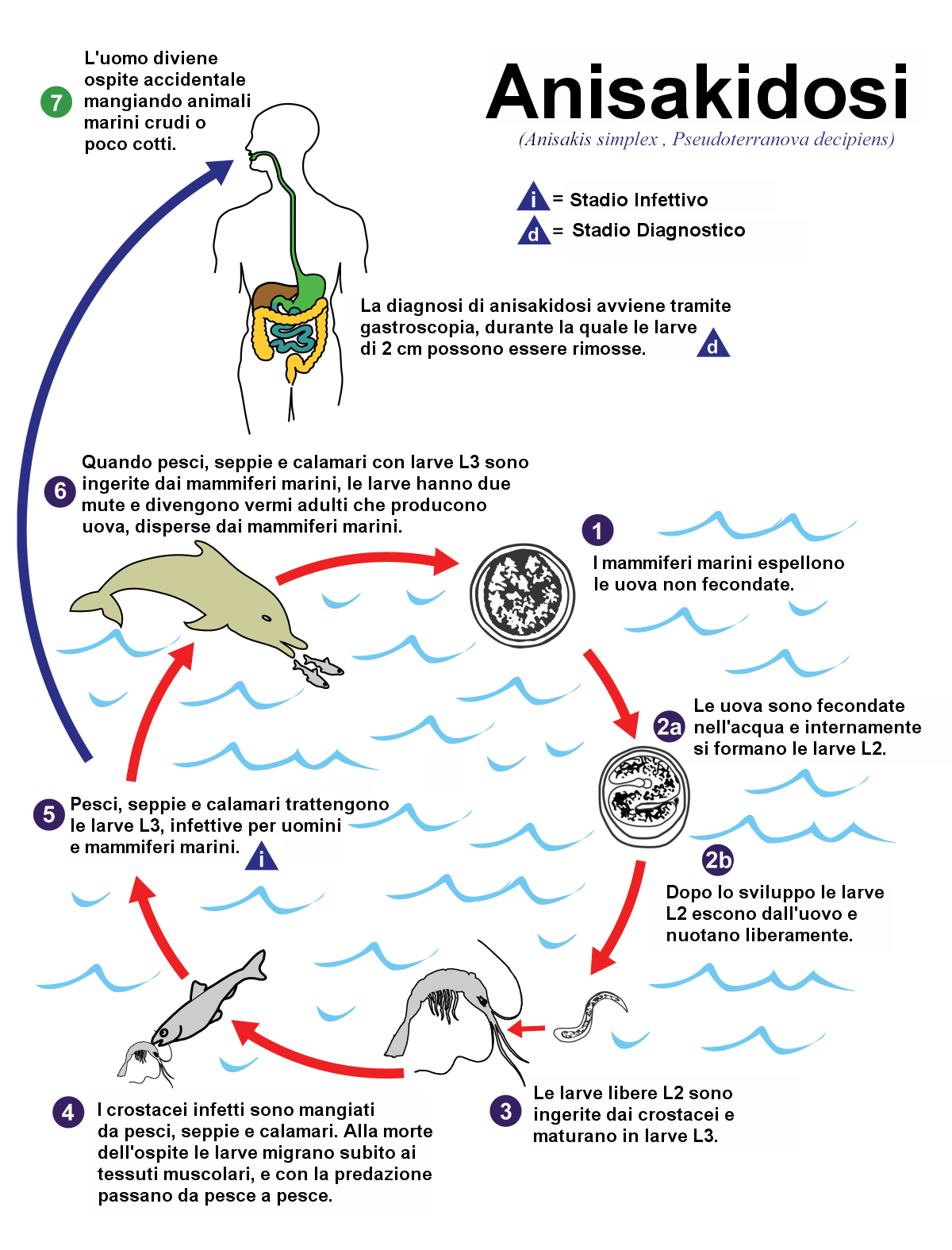 Il ciclo vitale di Anisakis simplex e Pseudoterranova decipiens, agenti causali della Anisakidosi. Ottenuto dal CDC Public Health Image Library. Image credit: CDC/Alexander J. da Silva, PhD/Melanie Moser (PHIL #3378), 2002.